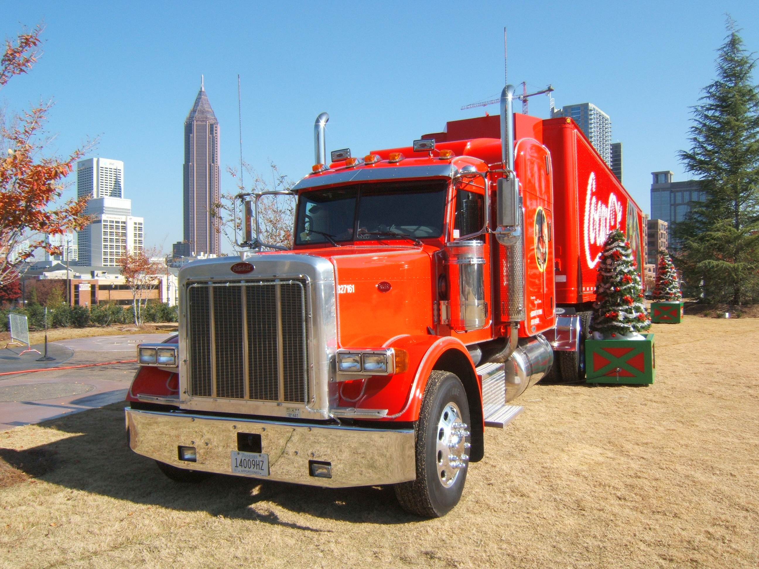 Camion (de marque Peterbilt) Coca-Cola devant le "World of Coca-Cola" à Atlanta.